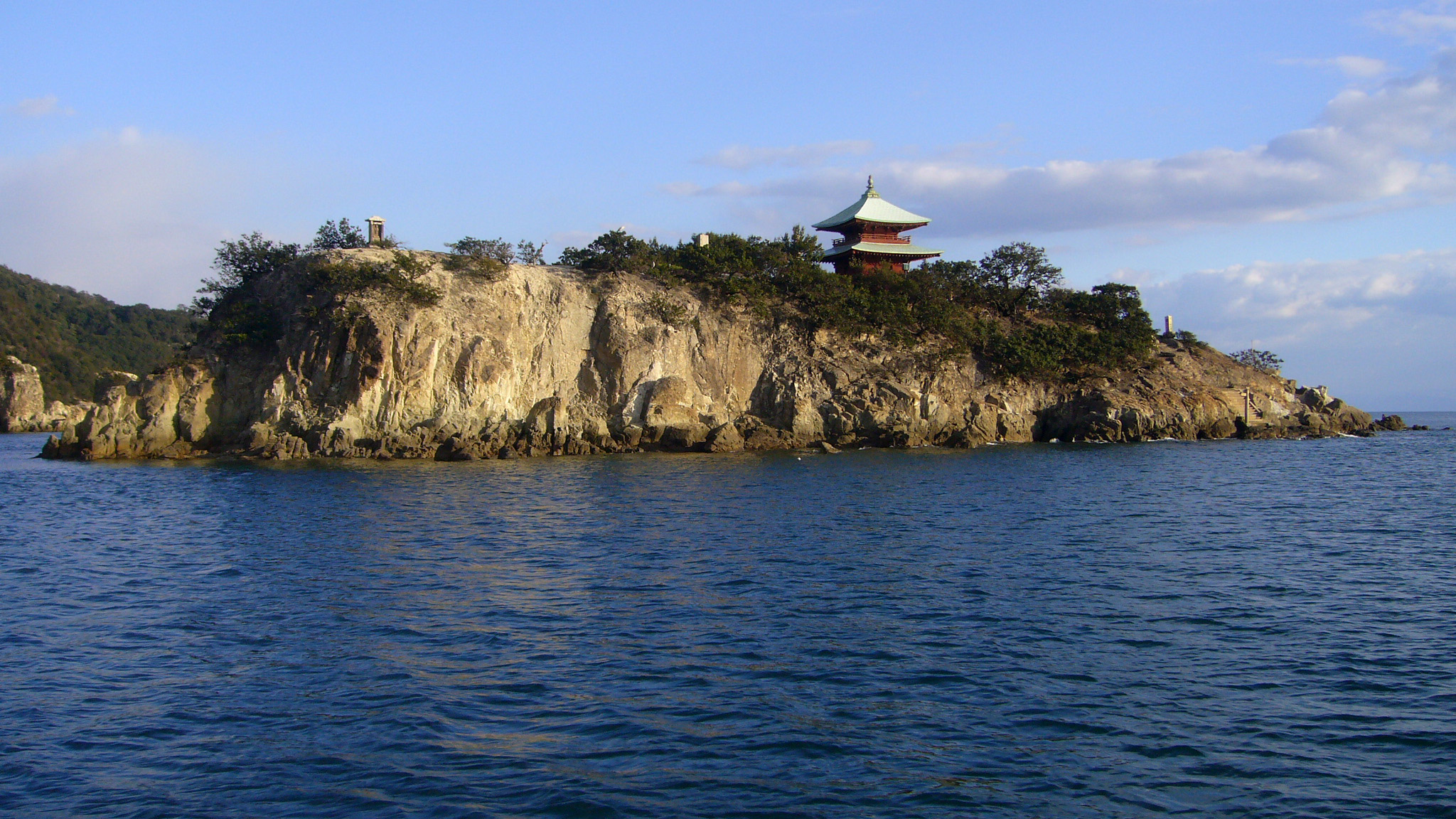 Benten Island in Fukuyama, Hiroshima, Japan